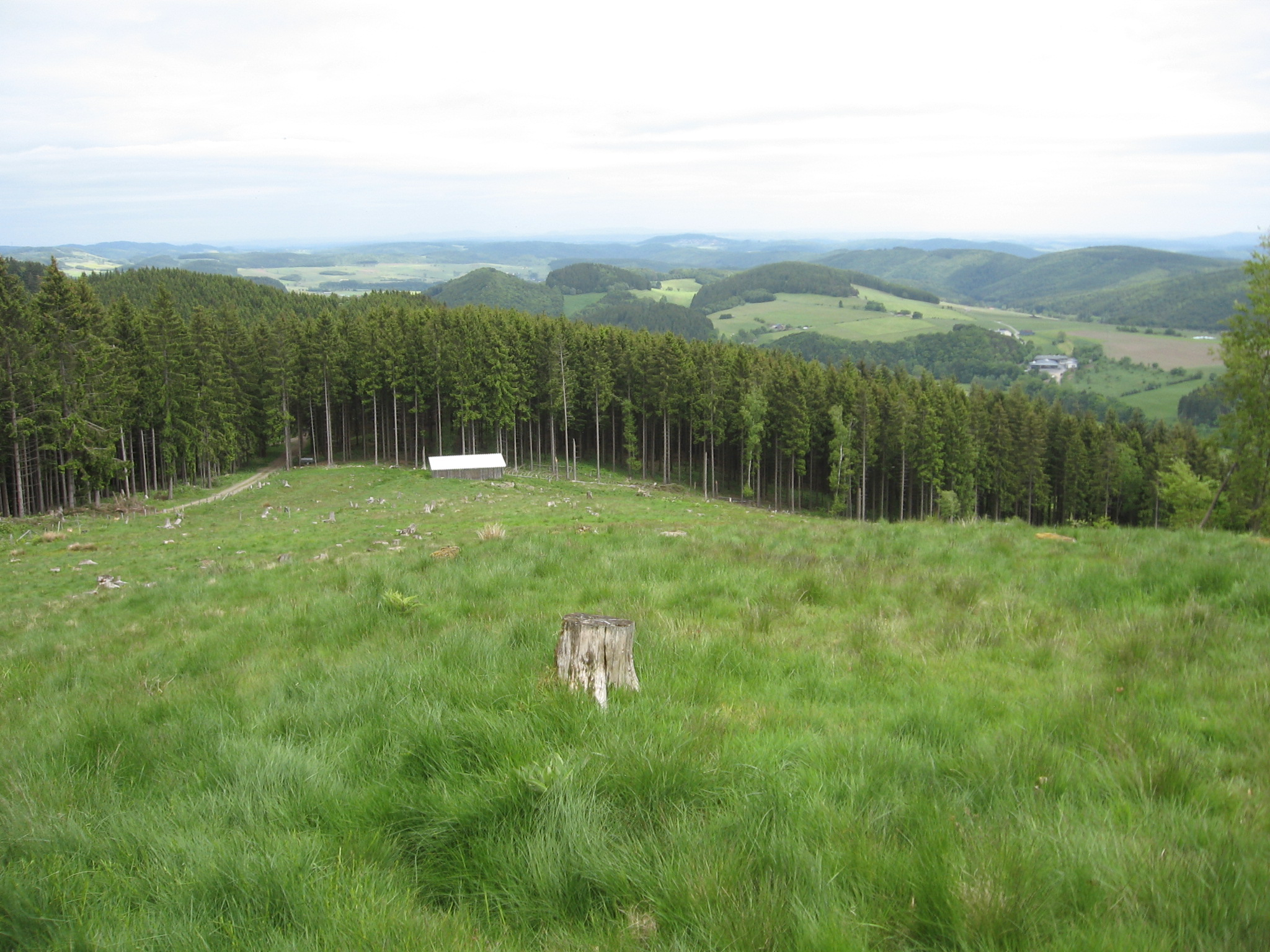 Östliche Bereich vom Naturschutzgebiet Wissinghauser Heide.